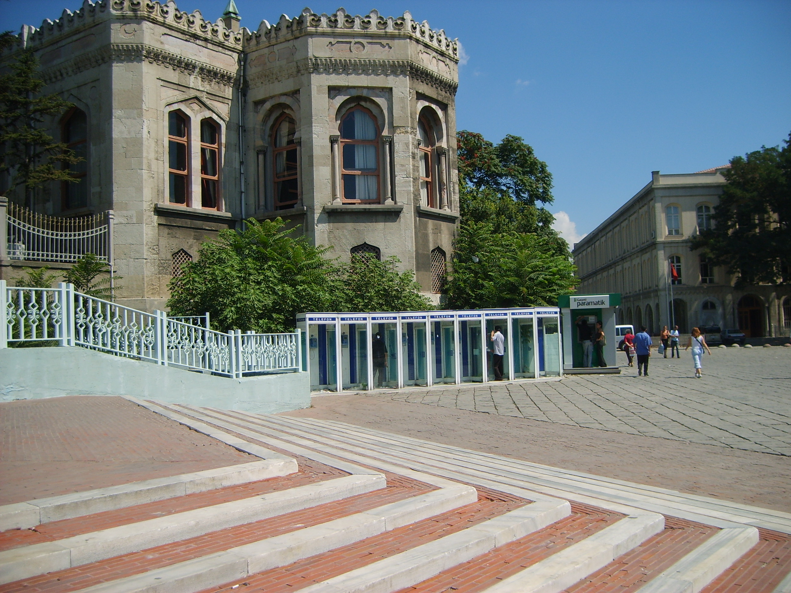 İstanbul Üniversitesi Beyazıt Yerleşkesi ana kapısından Beyazıt Meydanı'na inen merdivenler.